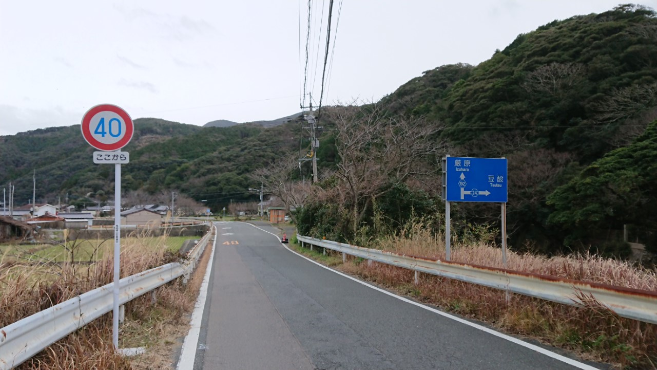 長崎県道192号瀬浦厳原港線 始点（佐須瀬）